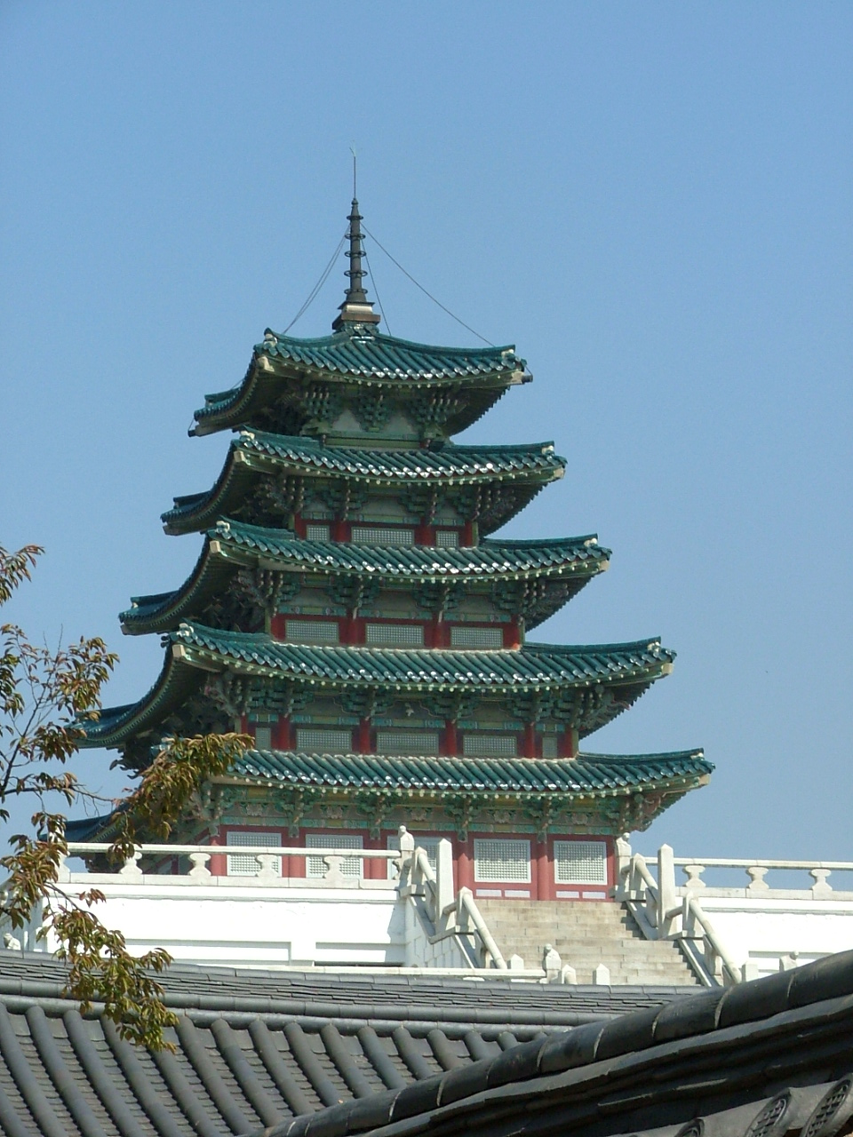 vue prise dans un parc historique de la ville prise par le contributeur, libre d'utilisation